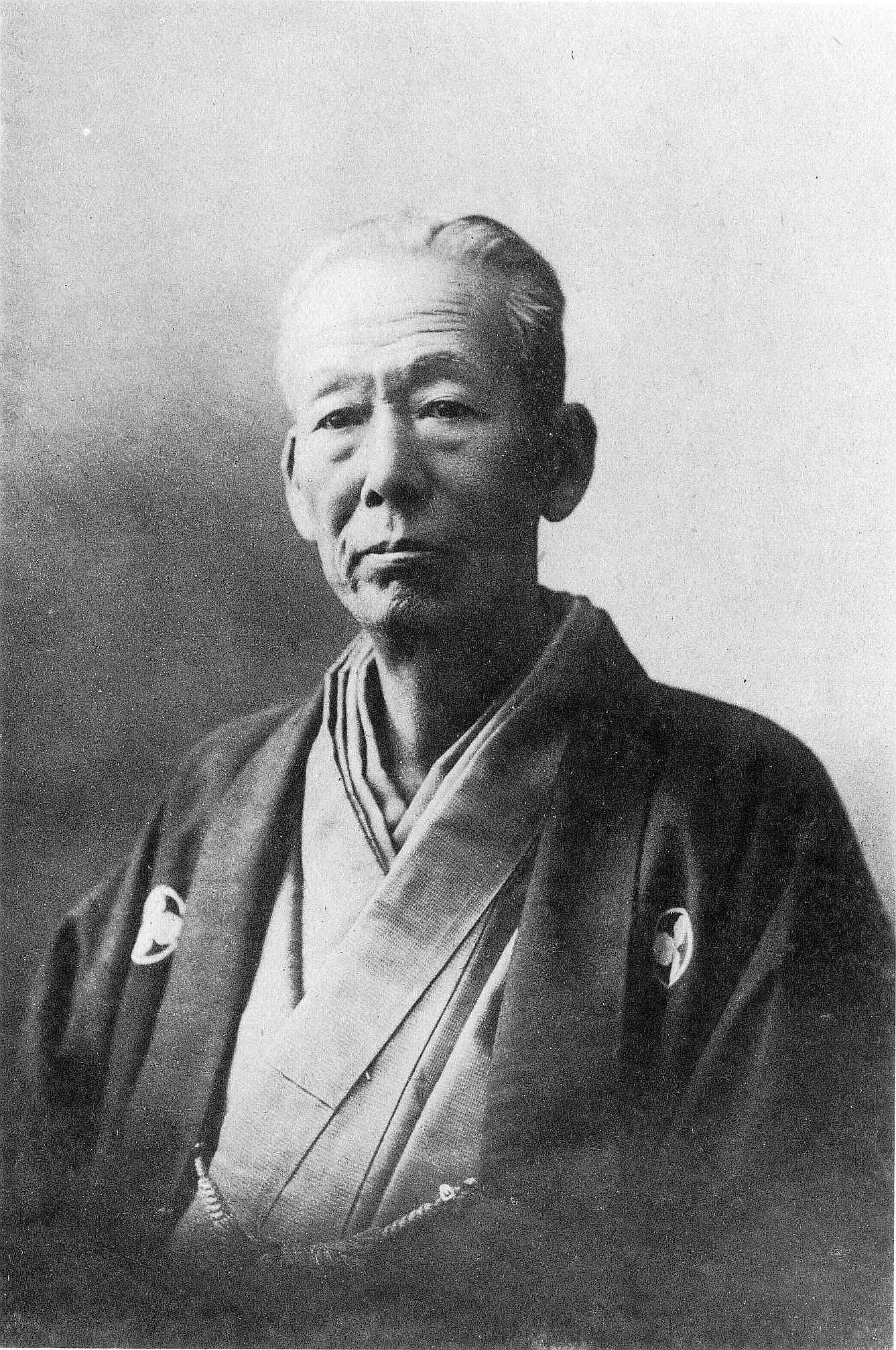 高島嘉右衛門の写真。